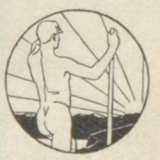 Johann Vincenz Cissarz Signet Verlag Georg Callwey